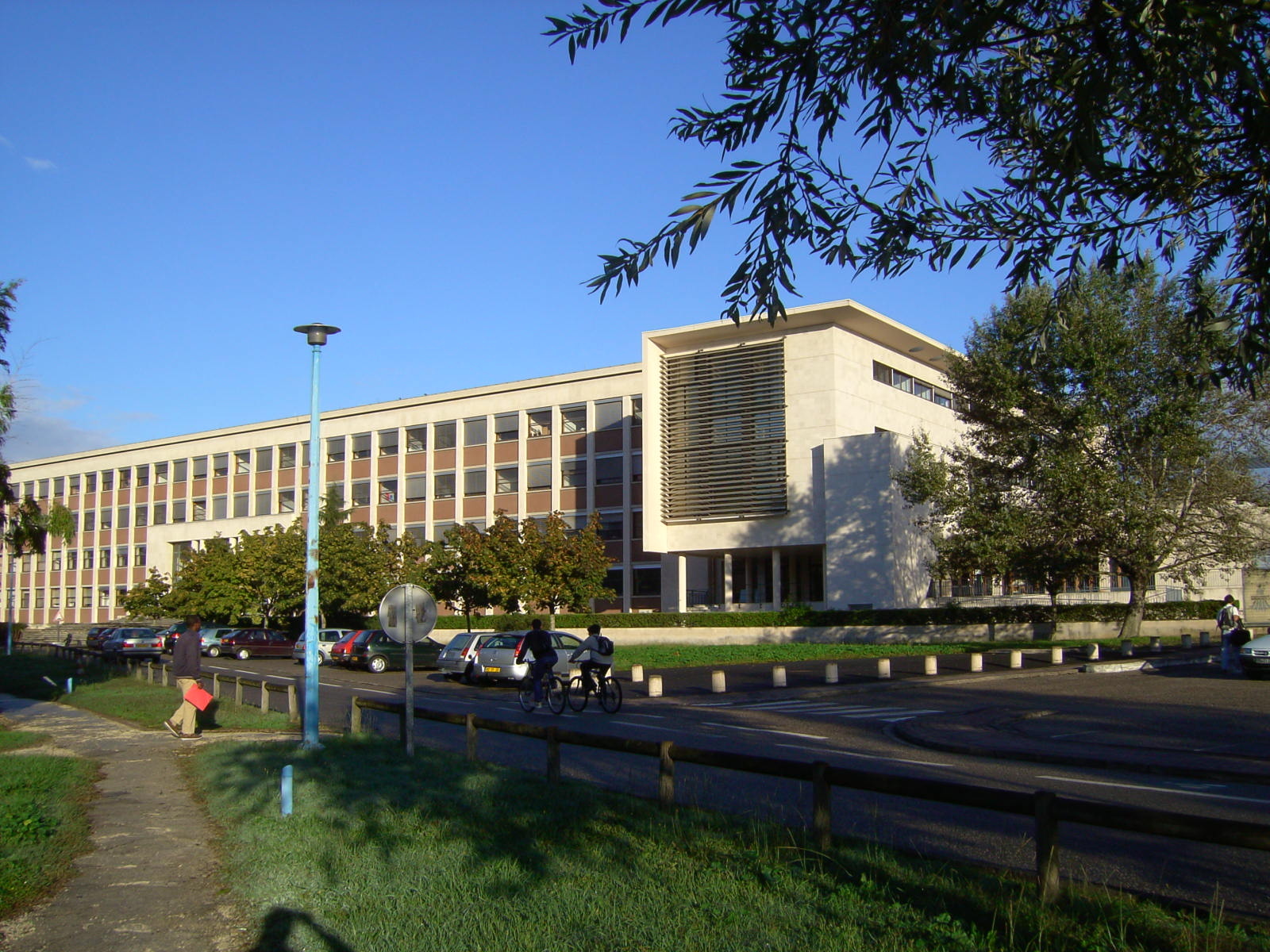 Partie du bâtiment A33 de l'Université Bordeaux 1, abritant l'U.F.R. Mathématiques et Informatiques / Bat. A33 of the Université Bordeaux 1